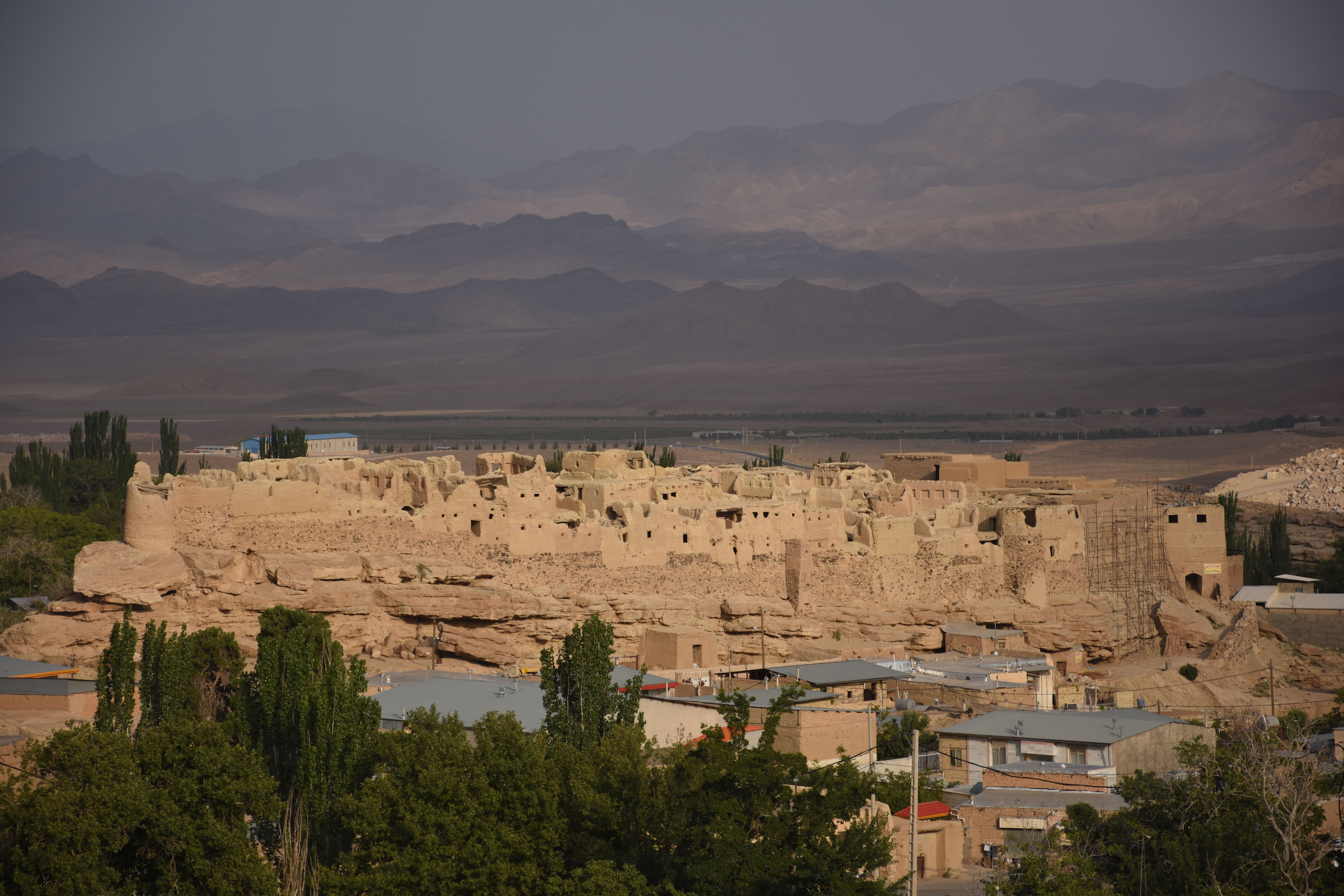 قلعه تاریخی طرق